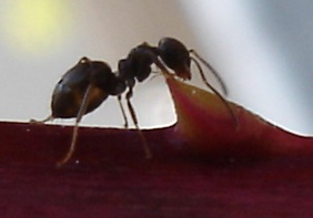 Nectaire et fourmi, photo prise à Mastaing (59)